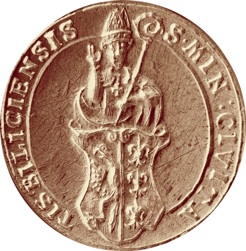 Pozytyw pieczęci miasta Bielska XVIII w. Napis: S.MIN: CIVITA/TIS BILICIENSIS. Herb miasta i postać św. Mikołaja